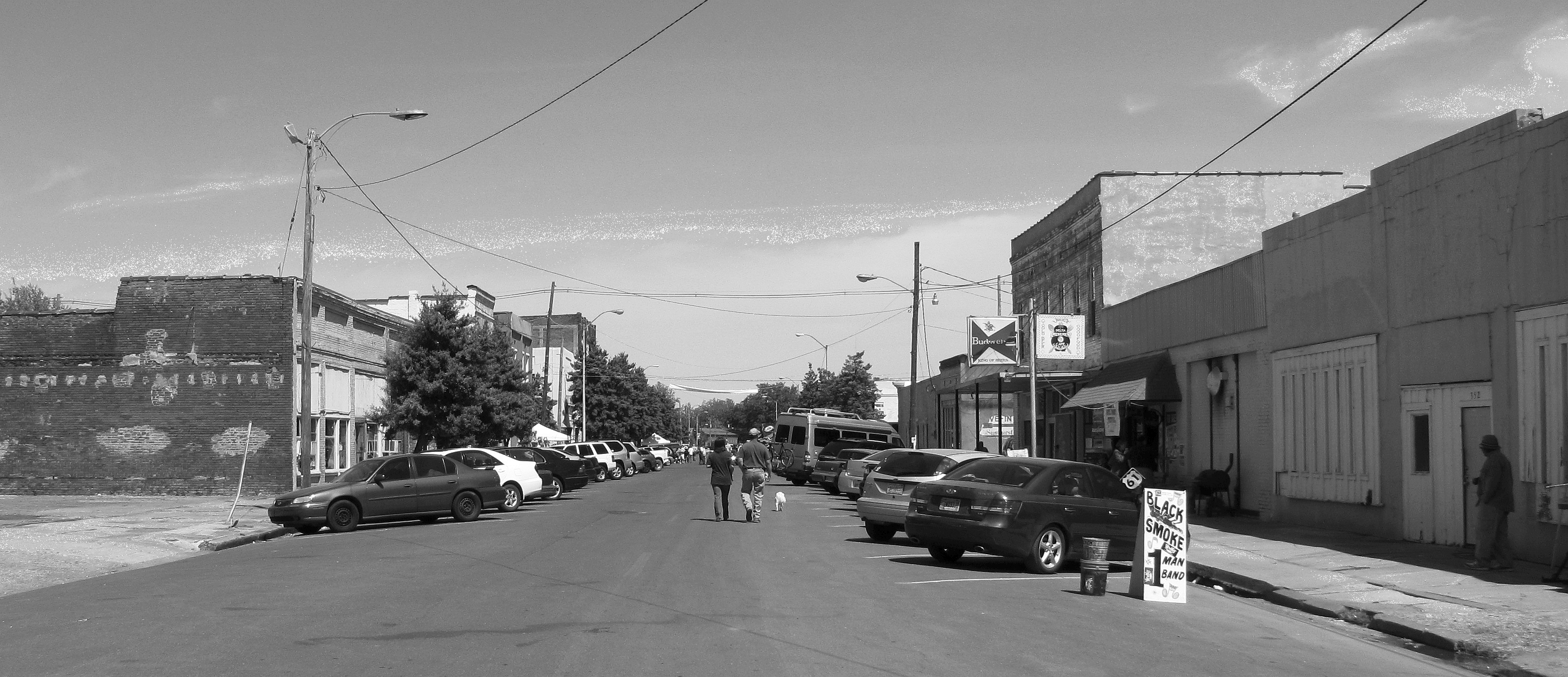 Delta Avenue in Clarksdale, Mississippi.